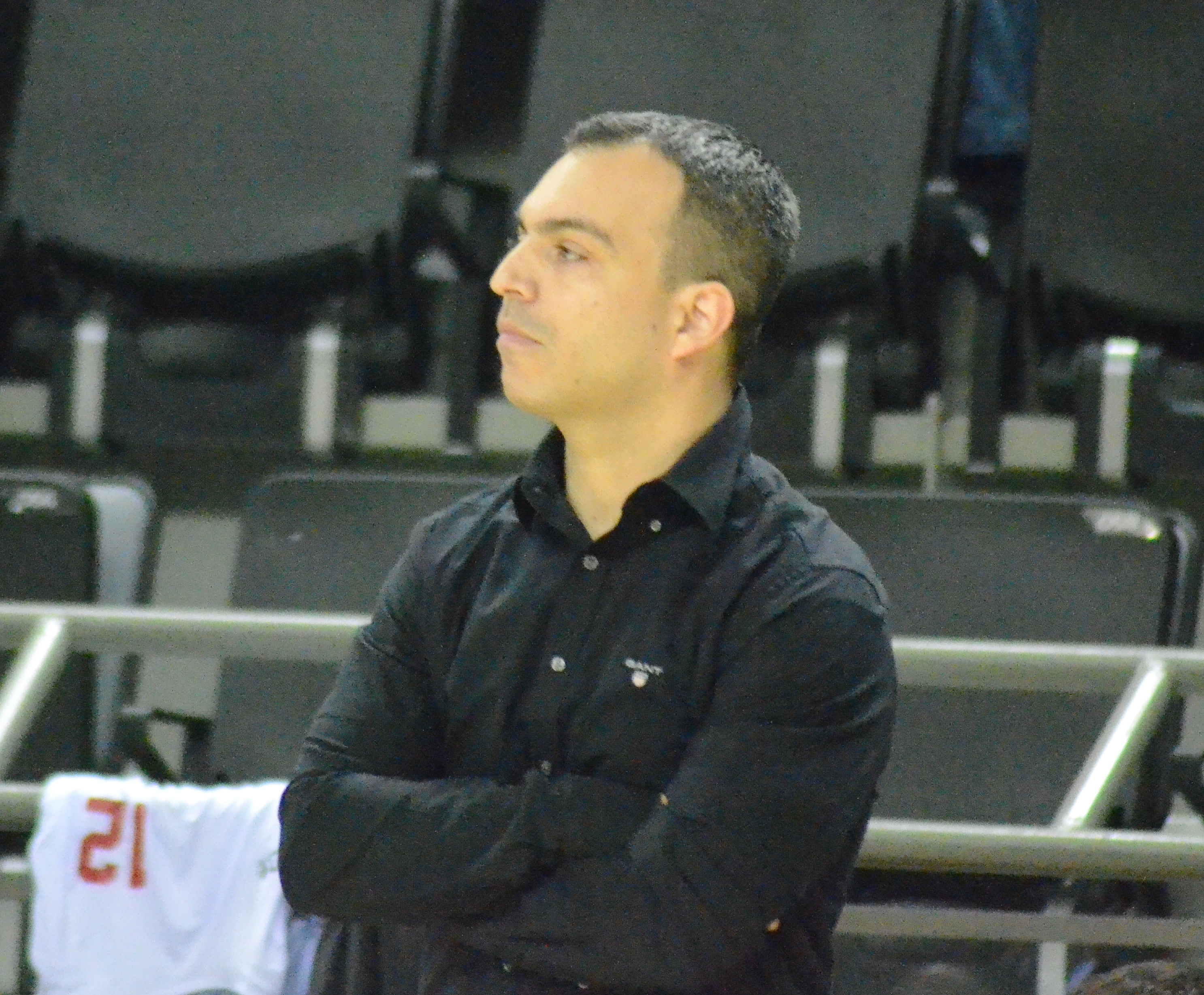 אלעד חסין כמאמן הפועל חיפה